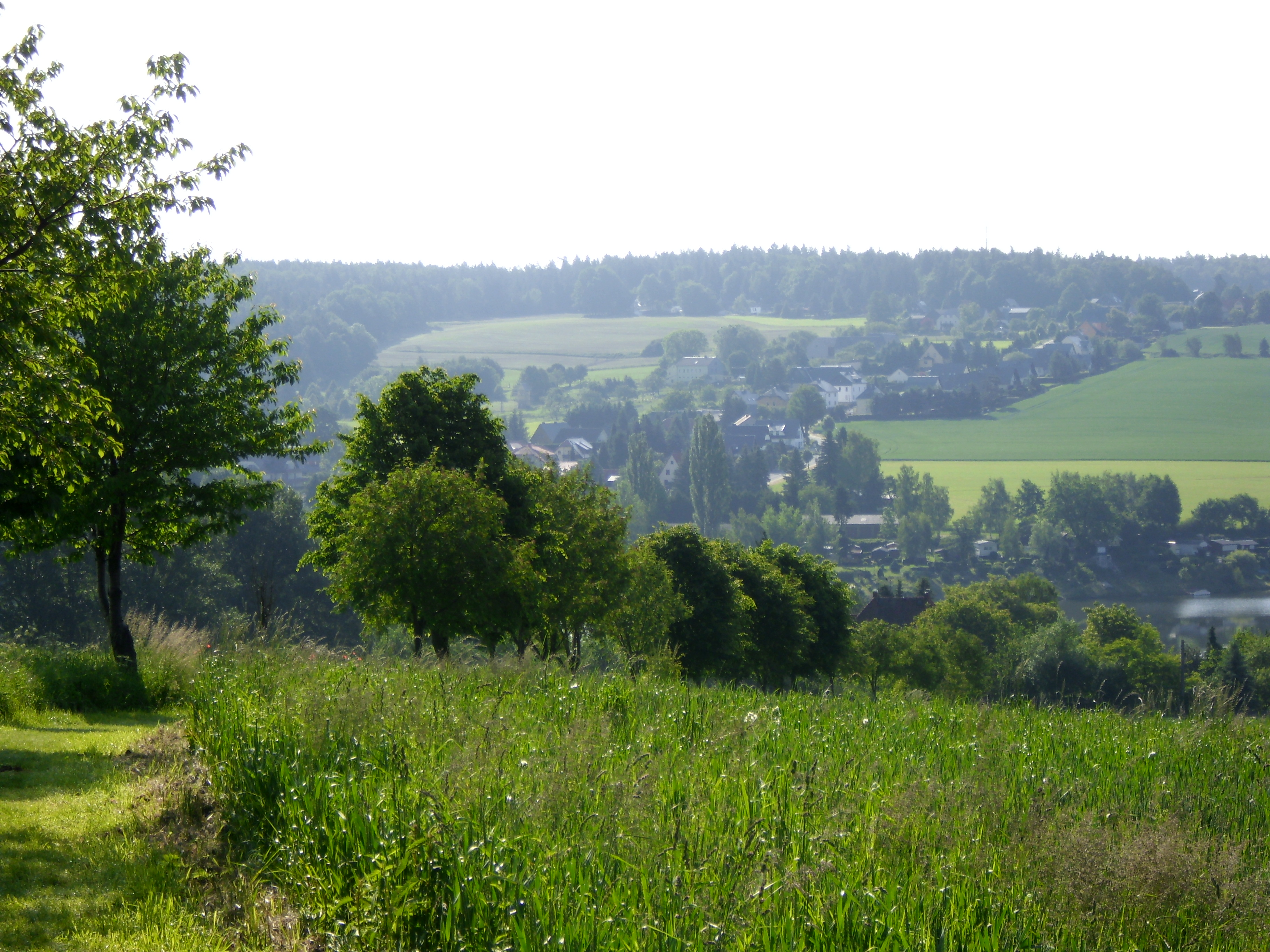 Blick vom Wildsteig in Seifersdorf auf den Alten Ortskern von Malter, der im Laufe der Jahre durch Neu Häuser ergänzt wurde.